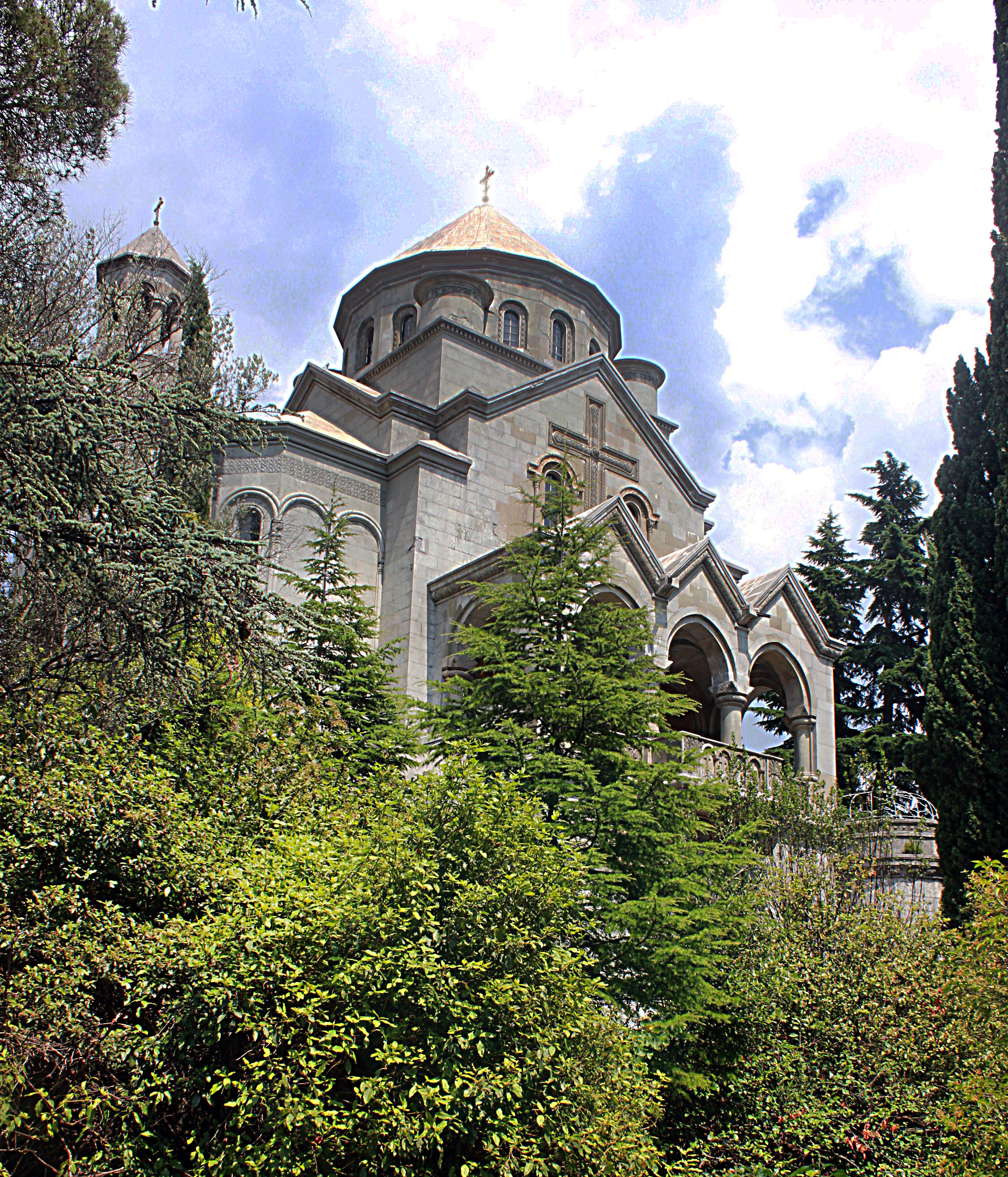 Сурб Ріпсіме. Архітектор Тер-Микаелян М. Г., Ялта